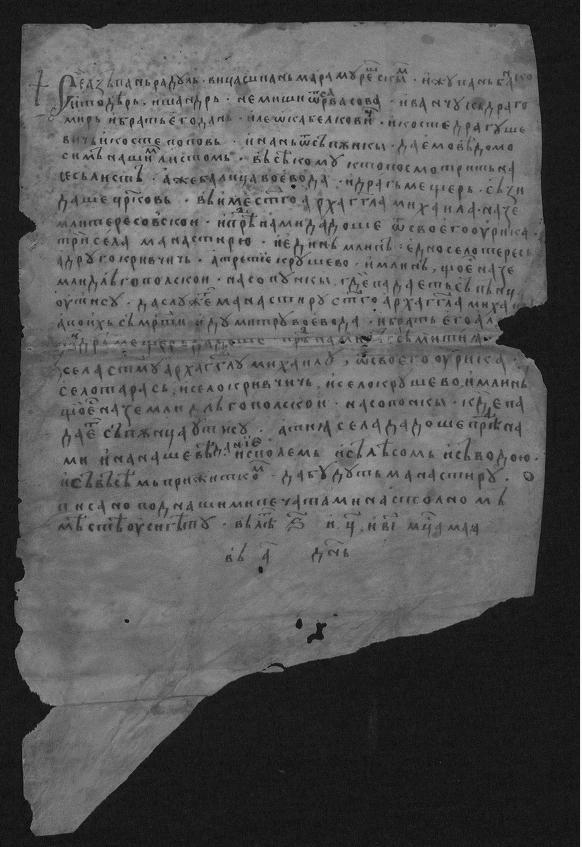 Documentul reprezintă o mărturie despre ctitorirea şi posesiunile mănăstirii Peri, pecetluită de către Radu, vicecomite al Maramureşului, alături de care stau nobili din cinci sate. Sunt menţionaţi primii donatari - voievodul Balc şi „meşterul” Drag, respectiv fii celui dintâi, adică „voievodul” Dumitru şi fratele acestuia, „meşterul” Alexandru.